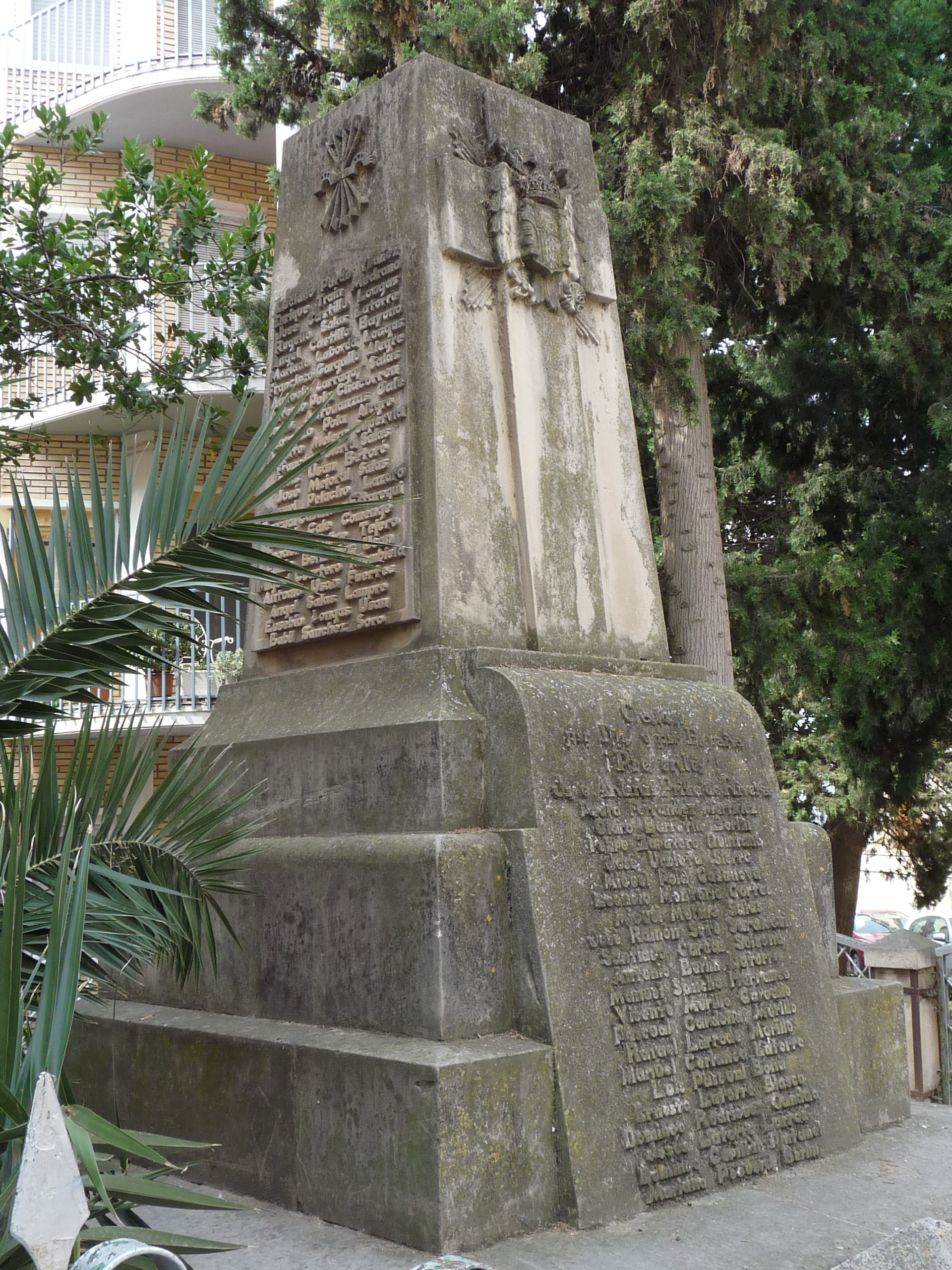 Tauste - Monumento a los "Caídos por la patria"